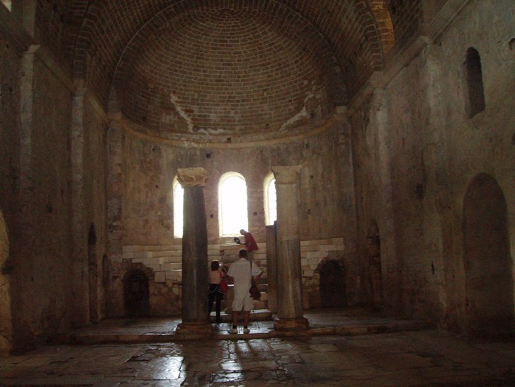 Внутренний вид церкви Святого Николая